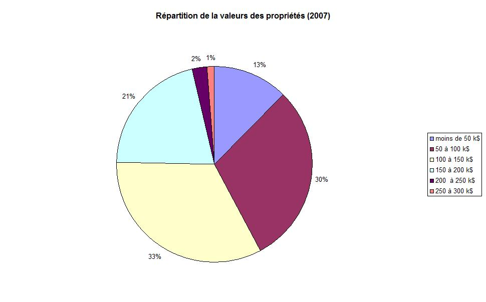 Répartition de la valeur des propriétés à Dudley (Géorgie, Etats-Unis) en 2007